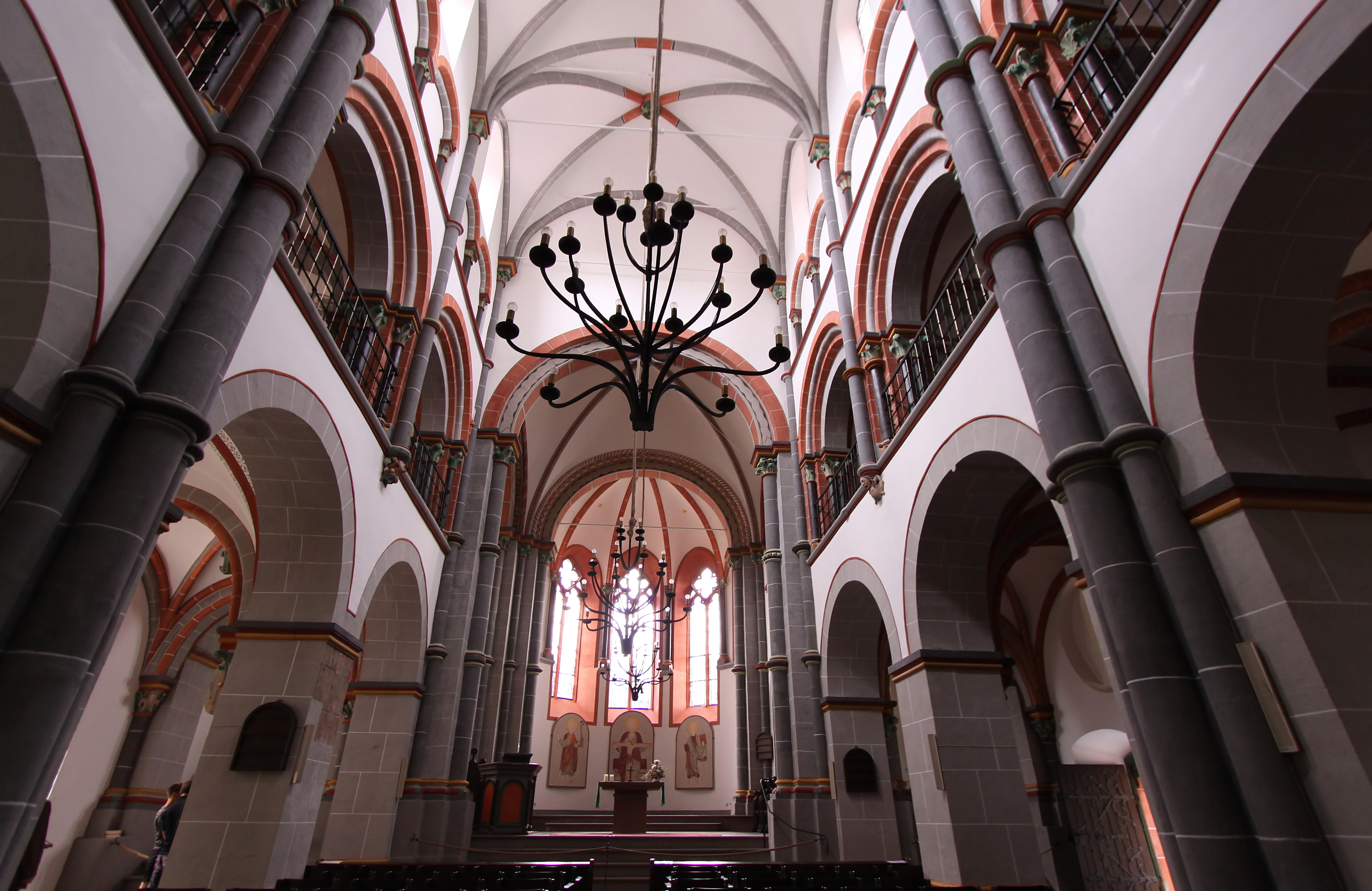 Bacharach am Rhein/Deutschland - dreischiffige, spätromanische Emporenbasilika St. Peter; Farbgebung entsprechend einer Ende des 19. Jahrhunderts vorgenommene Interpretation der spätromanischen Ausmalung